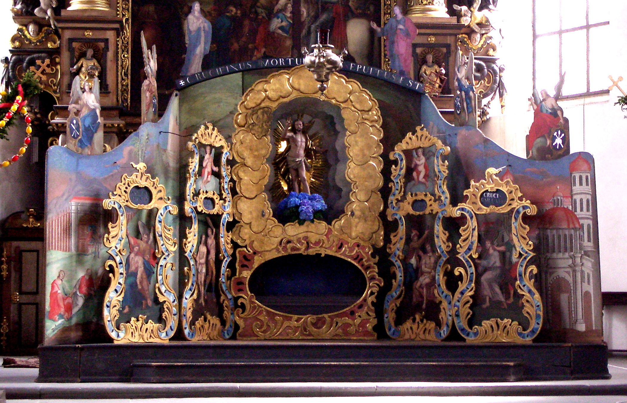 Ravensburg, Germany: Kloster Weißenau, Klosterkirche, Heiliges Grab